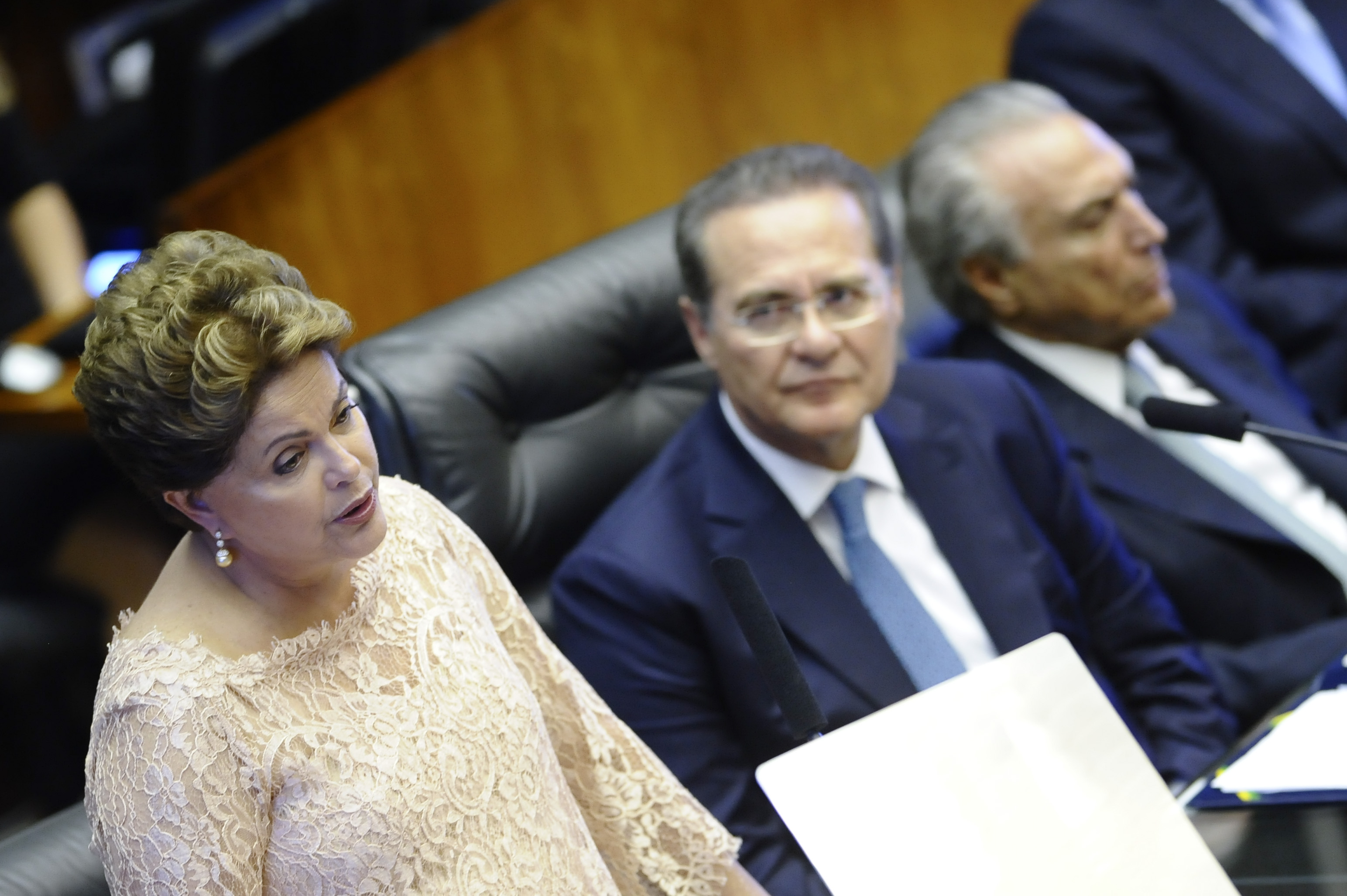 Plenário da Câmara dos Deputados durante solenidade de posse da presidente da República, Dilma Rousseff e vice-presidente Michel Temer. Em discurso, presidente Dilma Rousseff. Foto: Pedro França/Agência Senado